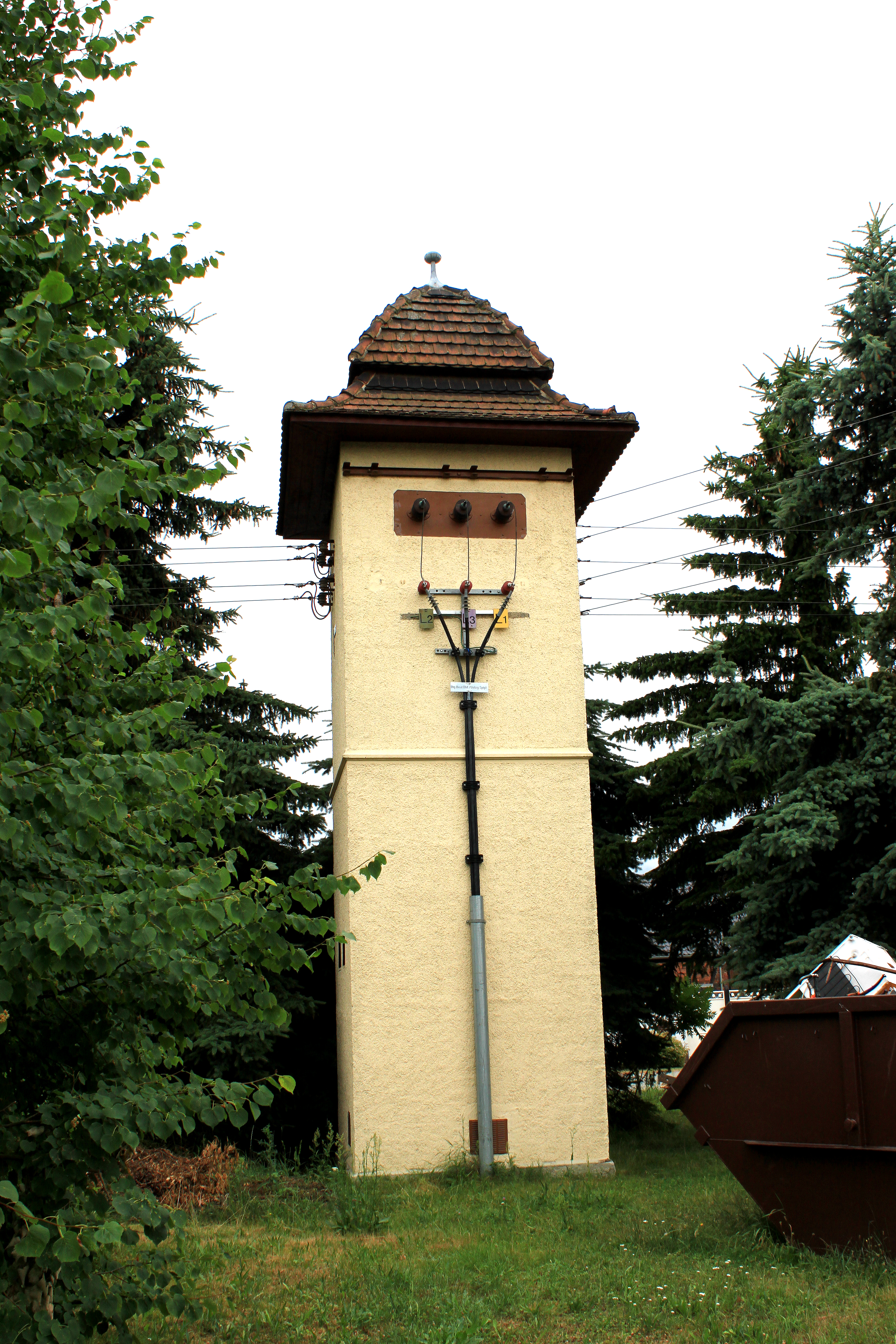 Trafohaus in Langennaundorf